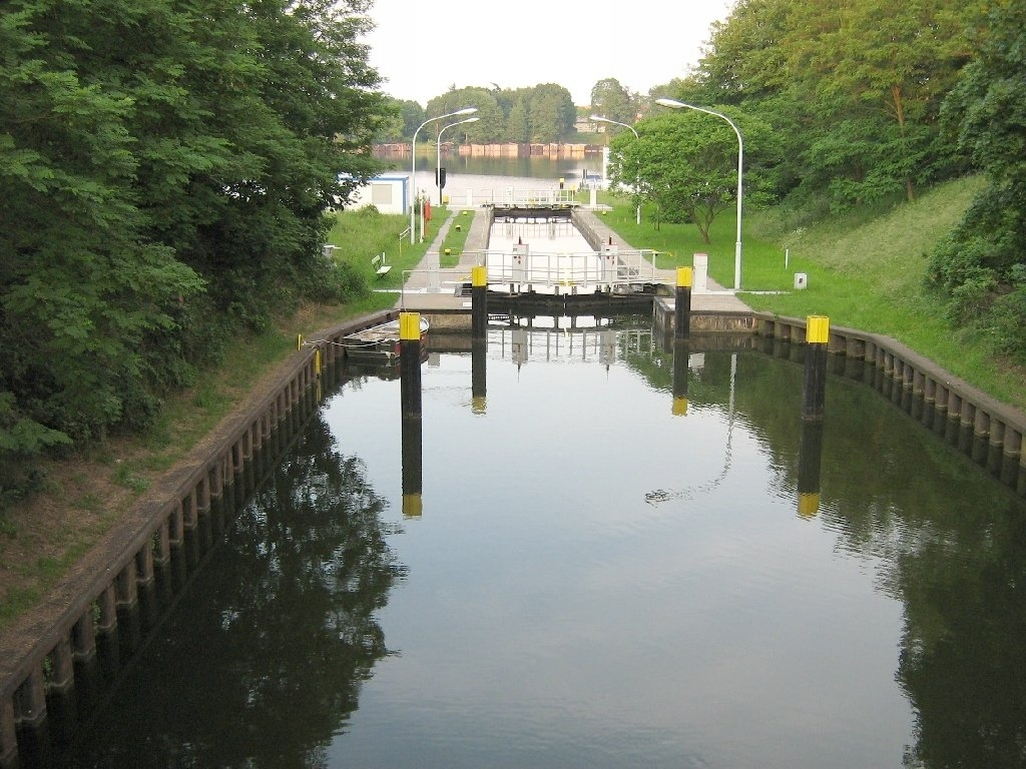 der Havelschleuse in Fürstenberg in der Mecklenburgische Seenplatte (Landkreis Oberhavel, Brandenburg, Germany). Fürstenberg, Brandenburgia, śluza na Haweli, stan z przed remontu w 2011